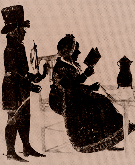 Scan eines Fotos eines um 1816 entstanden Scherenschnitts des Silhouetteurs Johann Caspar Dilly "Lesende Artländer Bäuerin"